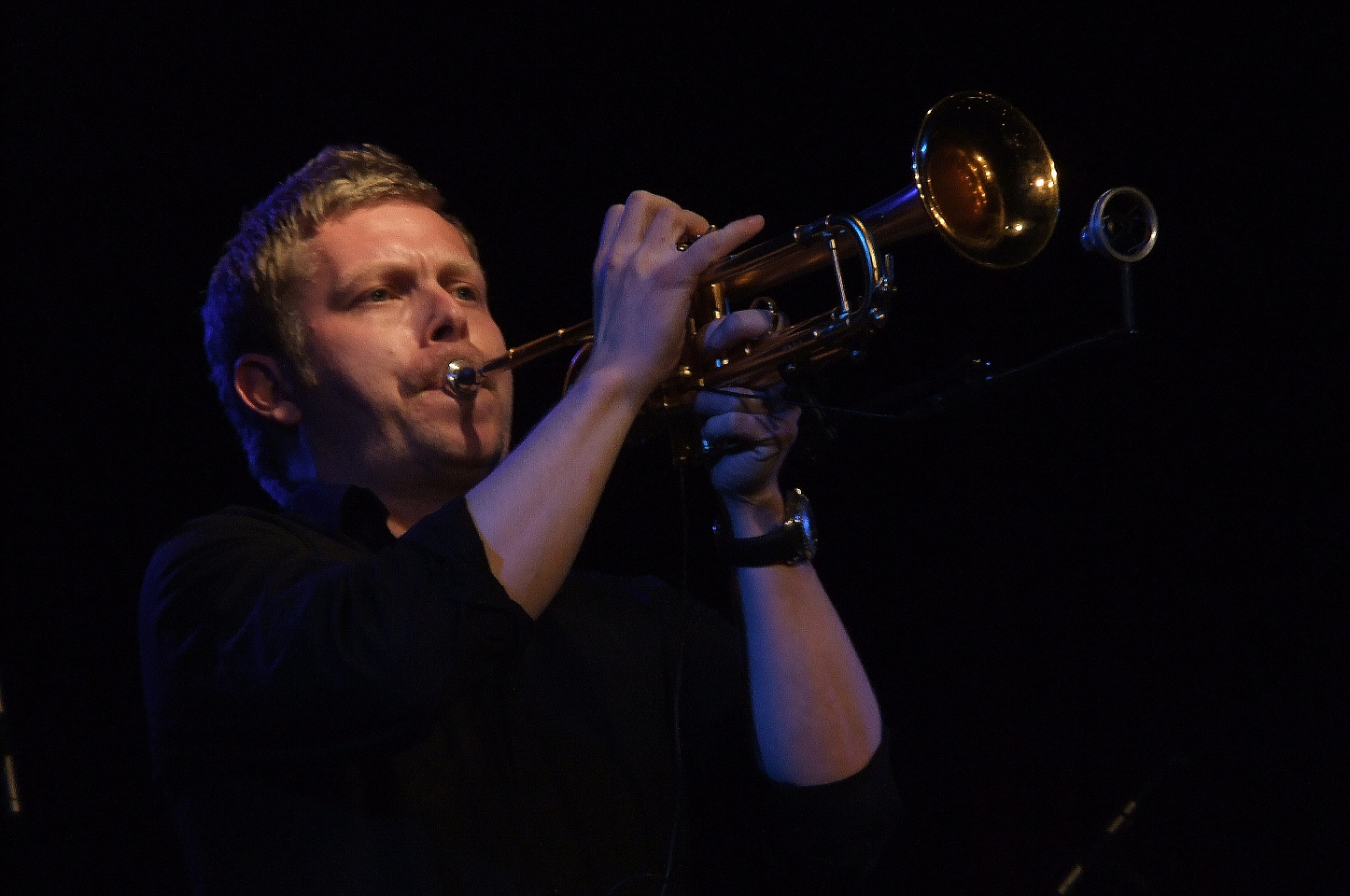 Nils Wülker in der Music Hall in Worpswede